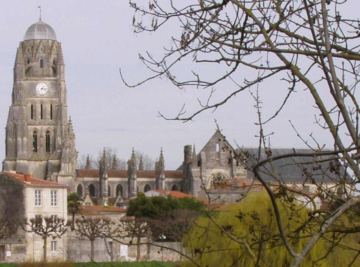 La cathédrale Saint Pierre, à Saintes, vue depuis la Charente, mars 2007